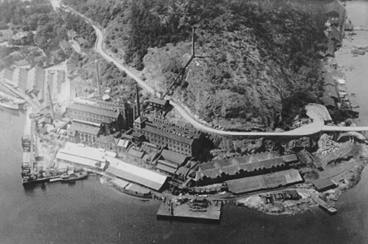 Gäddvikens Superfosfatfabriks anläggningar år 1936. Sundet mot Kvarnholmen fanns då ännu kvar. I mitten syns svavelsyrafabriken och vid stranden lagerbyggnader.